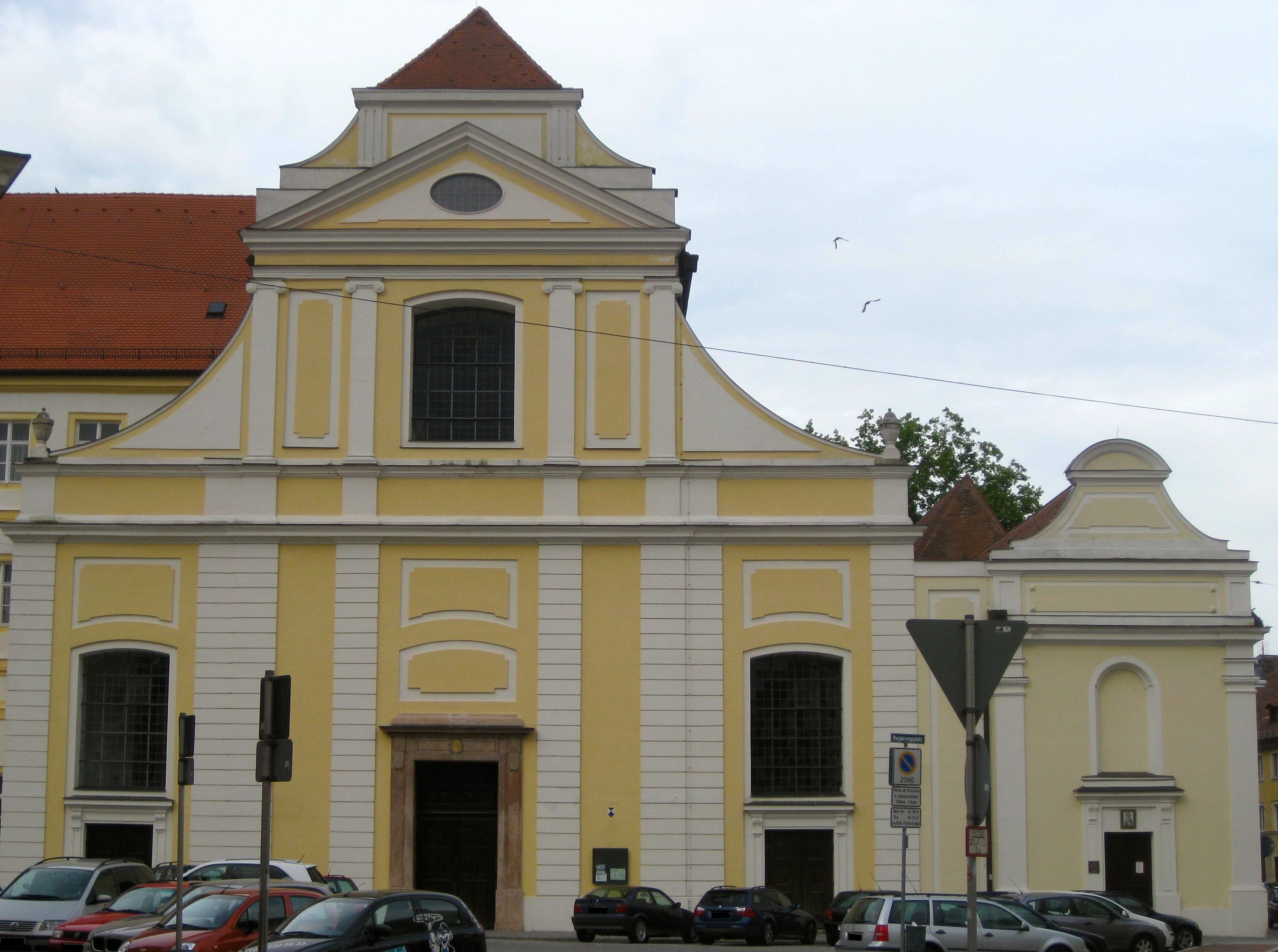 Dominikanerkirche Landshut, Frontseite